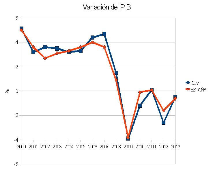 Gráfico de la variación anual del PIB en Castilla-La Mancha entre 2008 y 2013